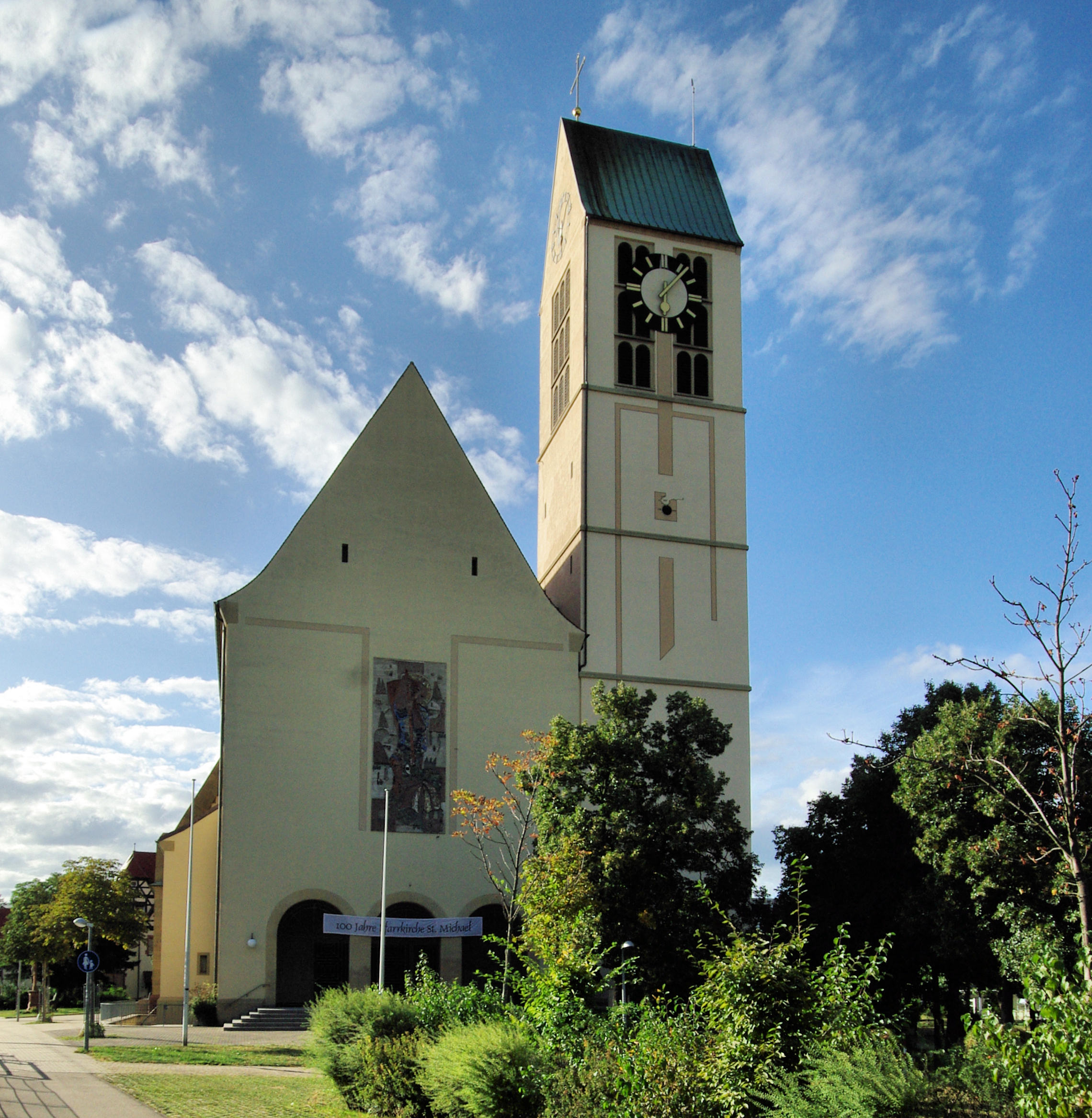 St,_Michael